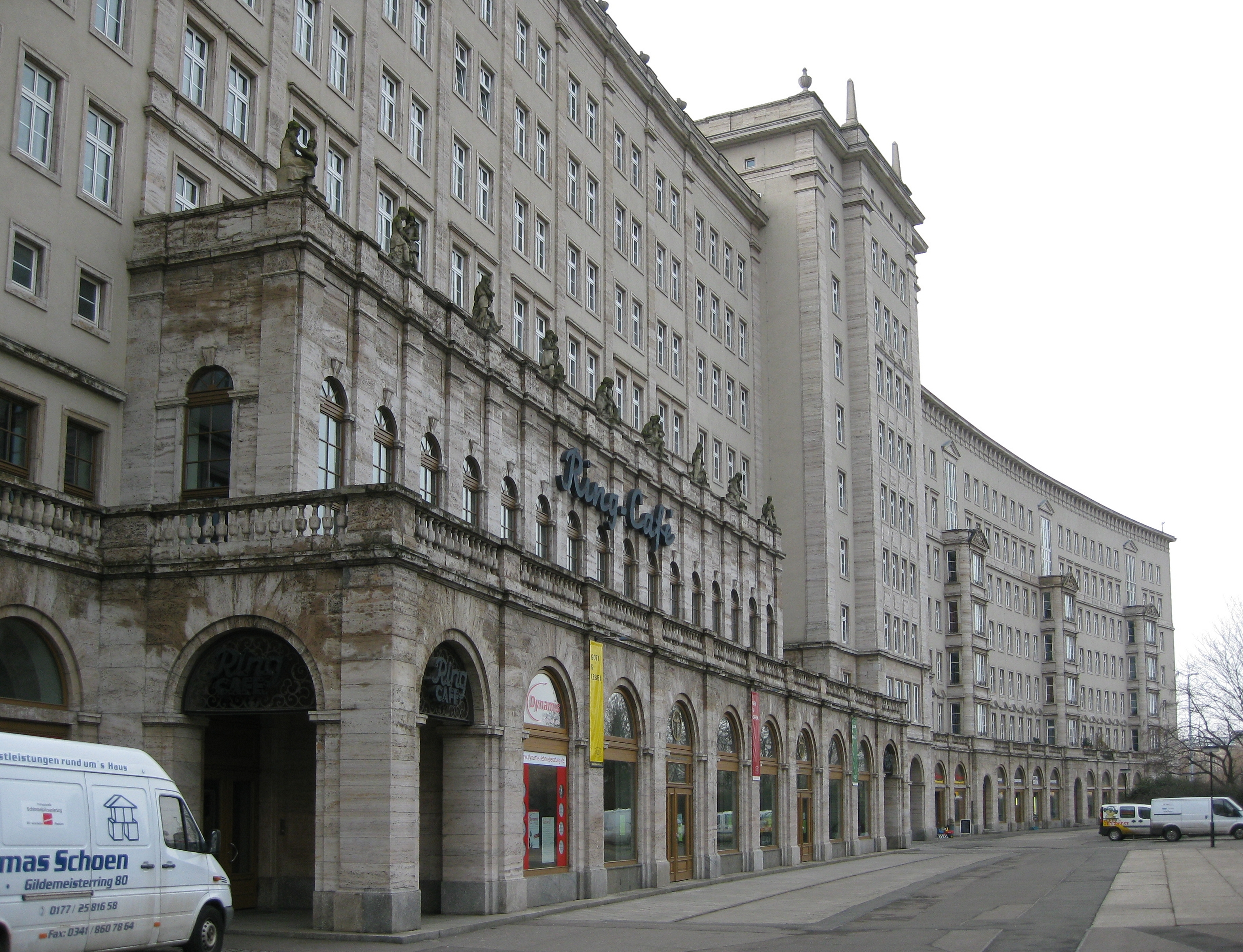 Leipzig, Roßplatz: denkmalgeschützte Wohnanlage aus den 1950er-Jahren mit dem Ring-Café